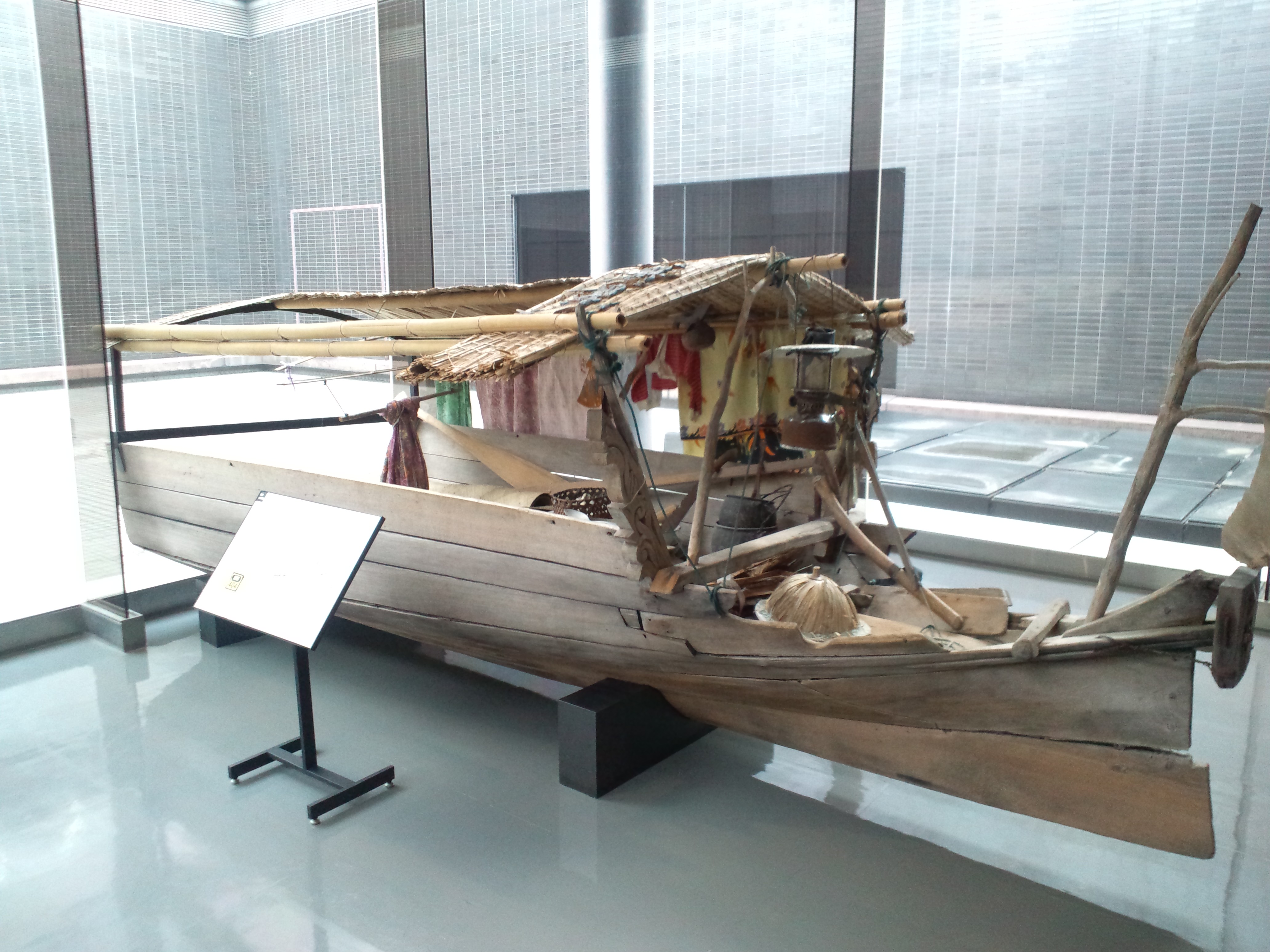 国立民族学博物館（大阪） 家船（マレーシア、サバ州、バジャウ族）